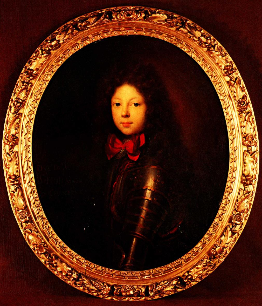 Portrait de Saint-Simon à 18 ans - 1692.